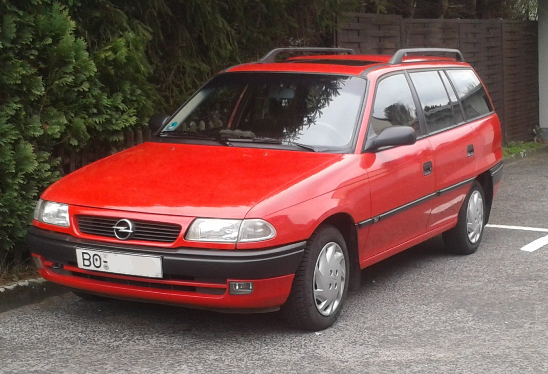 Opel Astra f Caravan 1994